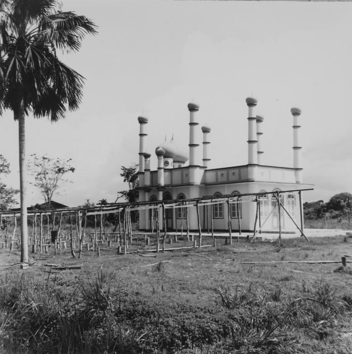 Negatief. Het Pad van Wanica heet tegenwoordig de Indira Gandhiweg en is de verbindingsweg tussen Paramaribo en de Johan Adolf Pengel Luchthaven (vroeger geheten Zanderij).. Moskee langs het Pad van Wanica